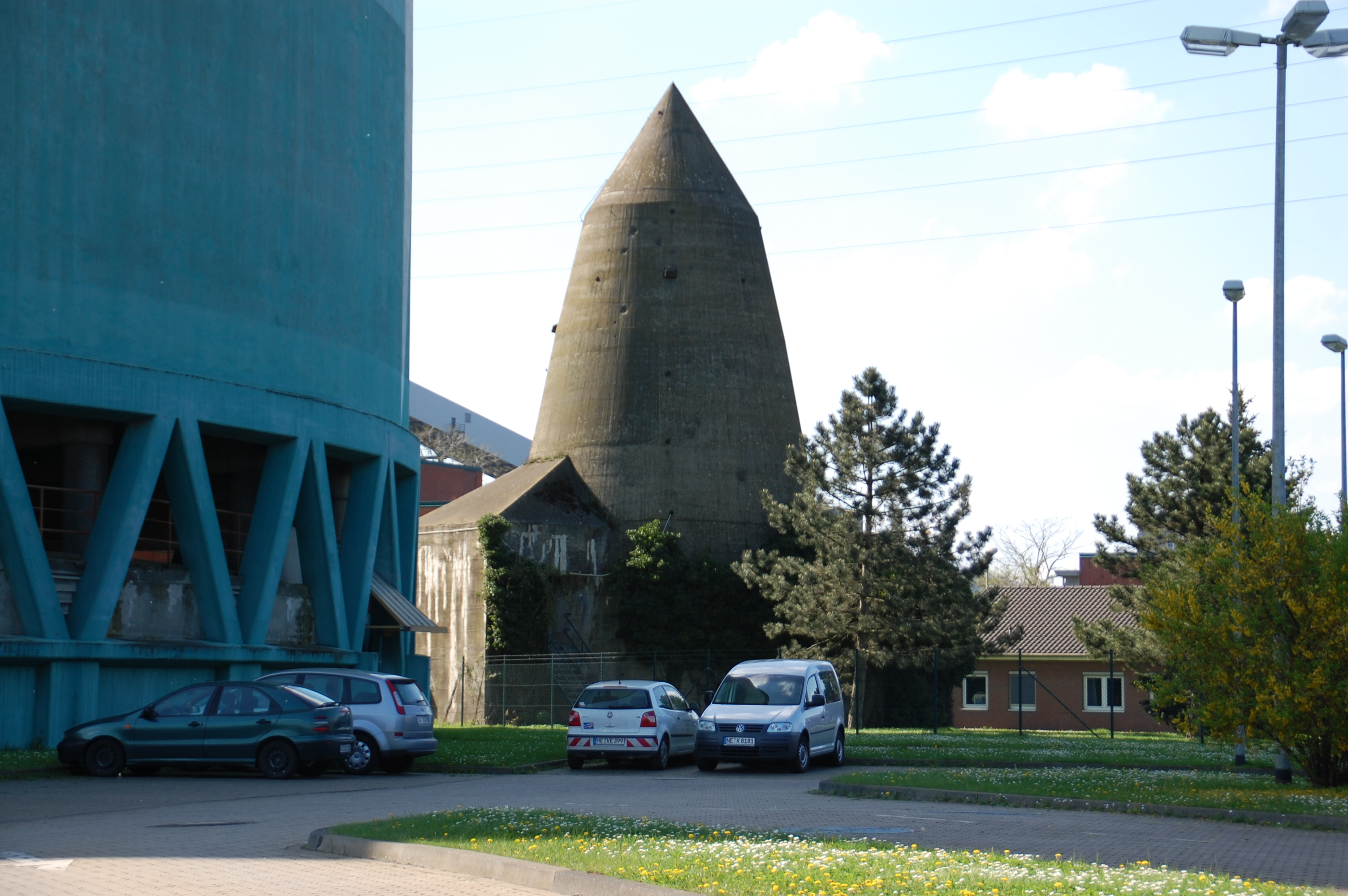 Hürth, Goldenberg-Werk, Luftschutz-Hochbunker und Kühlturm (links)